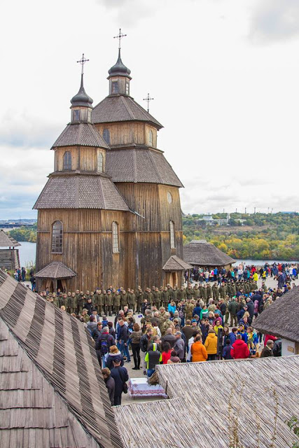 Січова церква ІКК "Запорізька Січ"